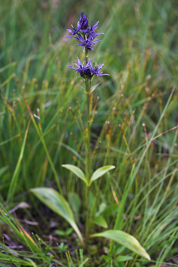 Swertia perennis - Sumpf-Enzian